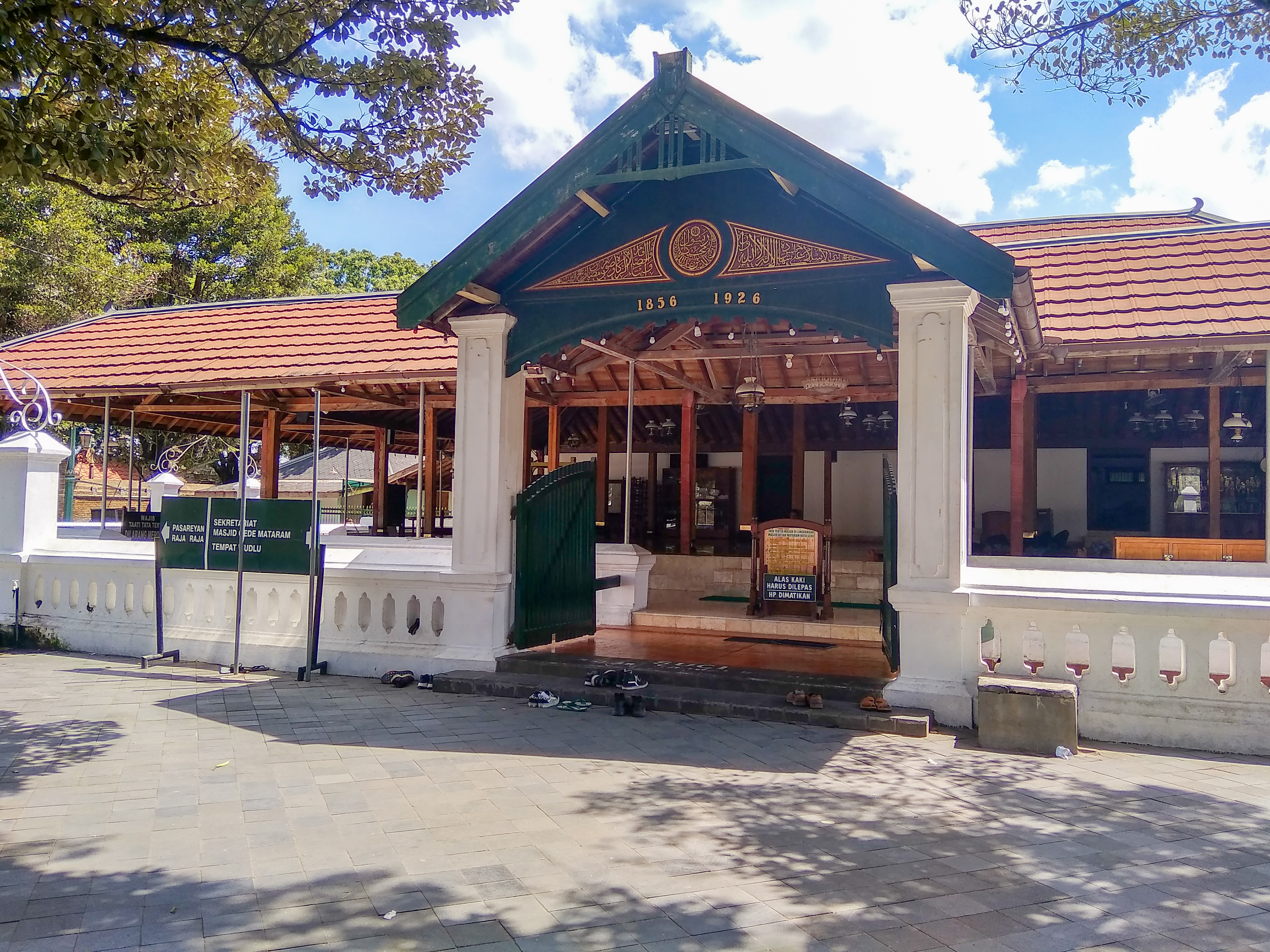 Masjid Kotagede dikenal juga dengan nama Masjid Gedhe Mataram. Lokasi bangunan ini di Dusun Sayangan, Jagalan, Banguntapan, Bantul. Masjid tersebut dibangun pada masa pemerintahan Sri Sultan Hamengku Buwono I pada tanggal 27 Juni 1773 Masehi. Kompleks Masjid Mataram Kotagede ditetapkan sebagai cagar budaya dengan Peraturan Menteri Kebudayaan dan Pariwisata Republik Indonesia No. PM.25/PW.007/MKP/2007 tanggal 26 Maret 2007.